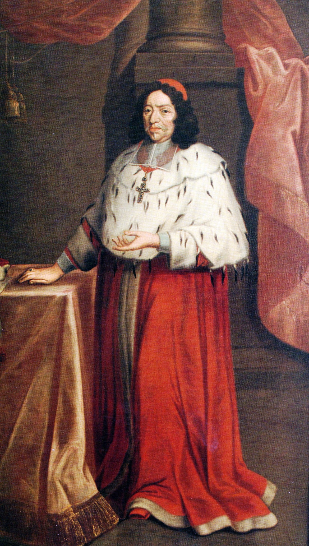 Lebensgroßes Gemälde des Kurfürsten und Erzbischof von Köln Maximilian Heinrich von Bayern